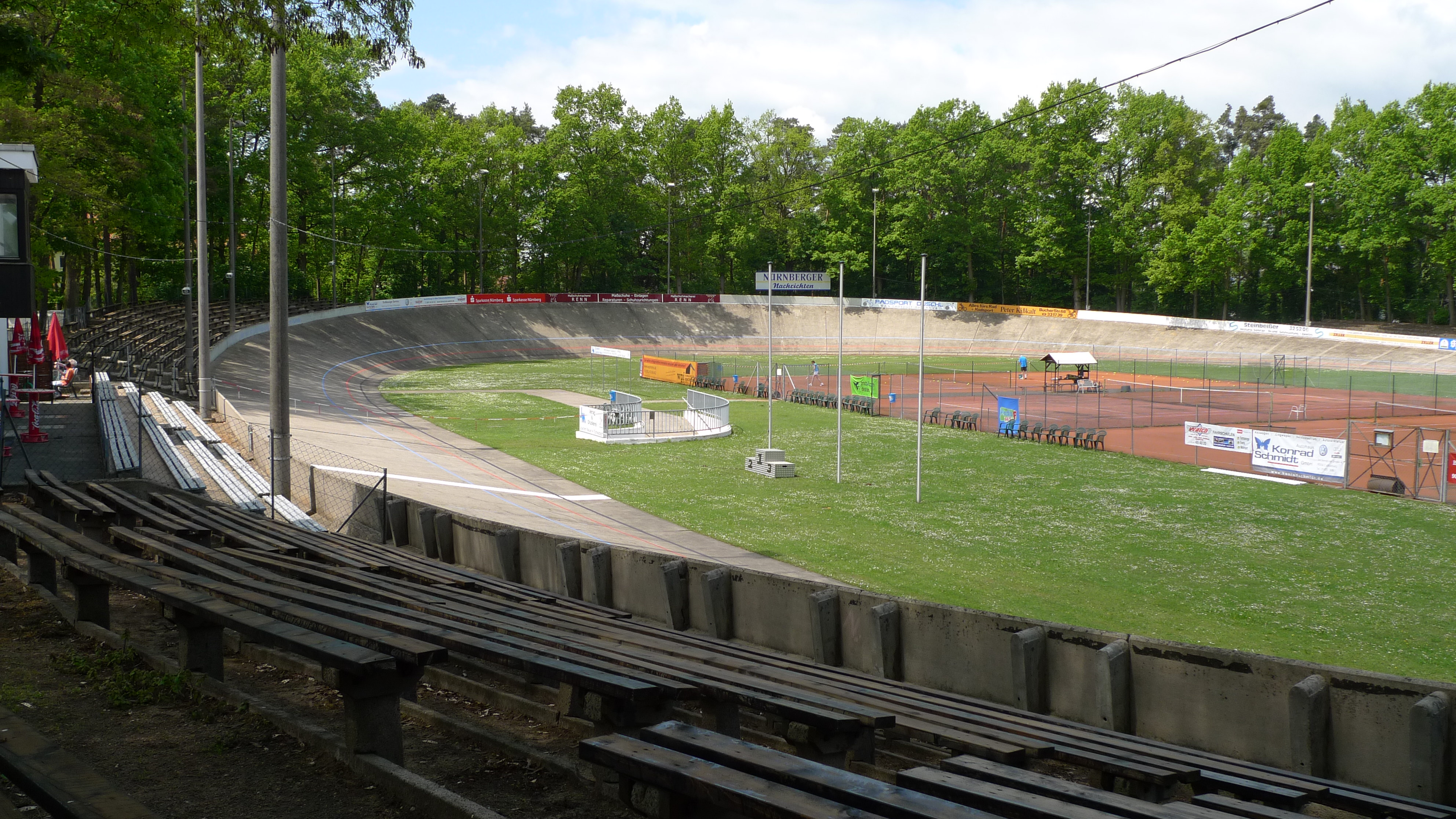 Radrennbahn Reichelsdorfer Keller im gleichnamigen Stadtteil von Nürnberg